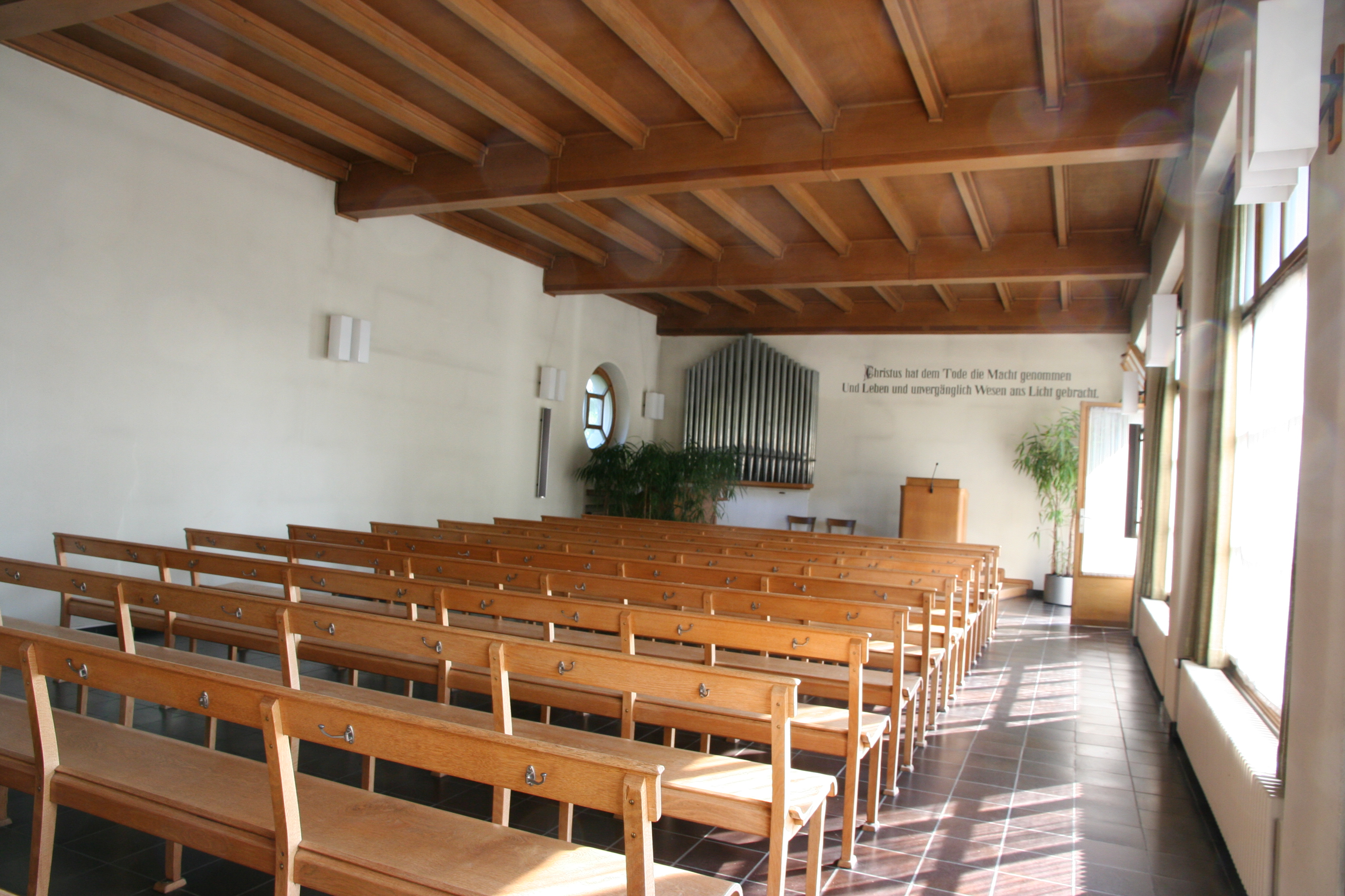 Friedhof Nordheim Kapelle